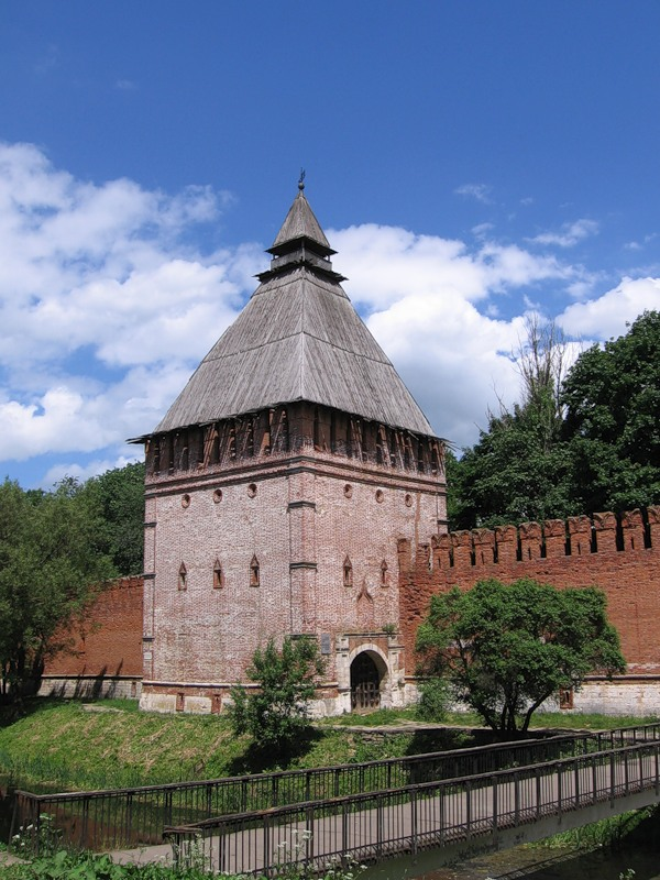 Копытенская надвратная башня (Смоленская область, Смоленск, город Смоленск, сквер Памяти героев, Маршала Жукова улица, Октябрьской Революции улица, Соболева улица, Студенческая улица, Тимирязева улица, центральный парк культуры и отдыха)